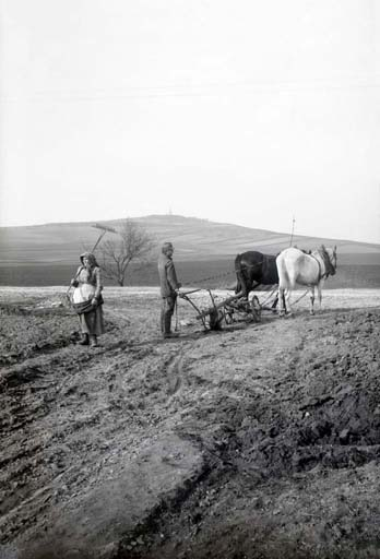 Bedřichov u Kolína, orba